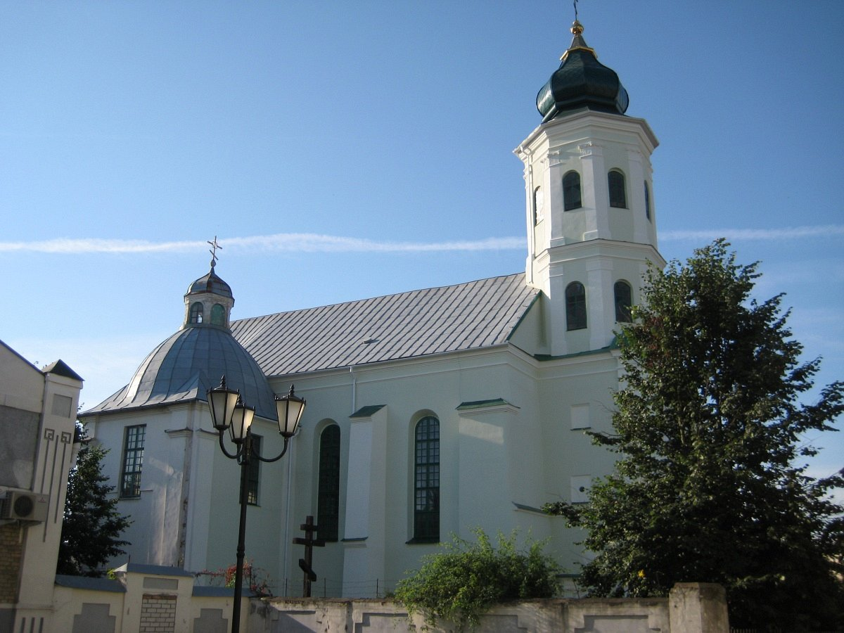 Краявіды Слоніма